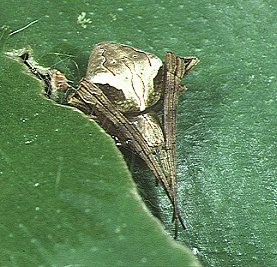 Acacesia cornigera from Costa Rica.